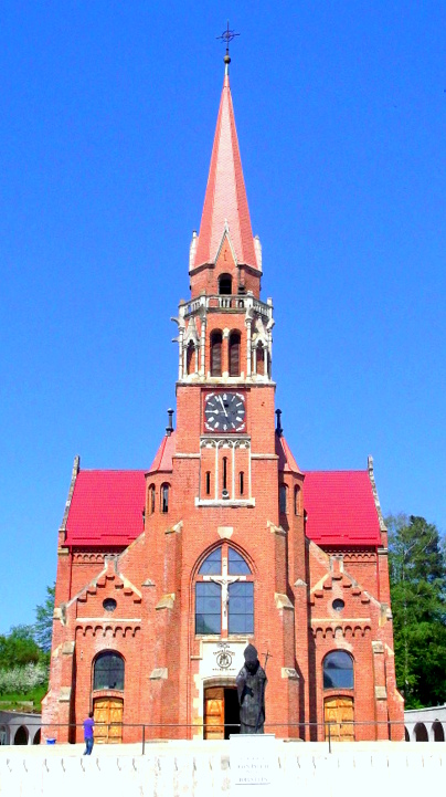 Rumunia, Kaczyka, kościół rzymskokatolicki